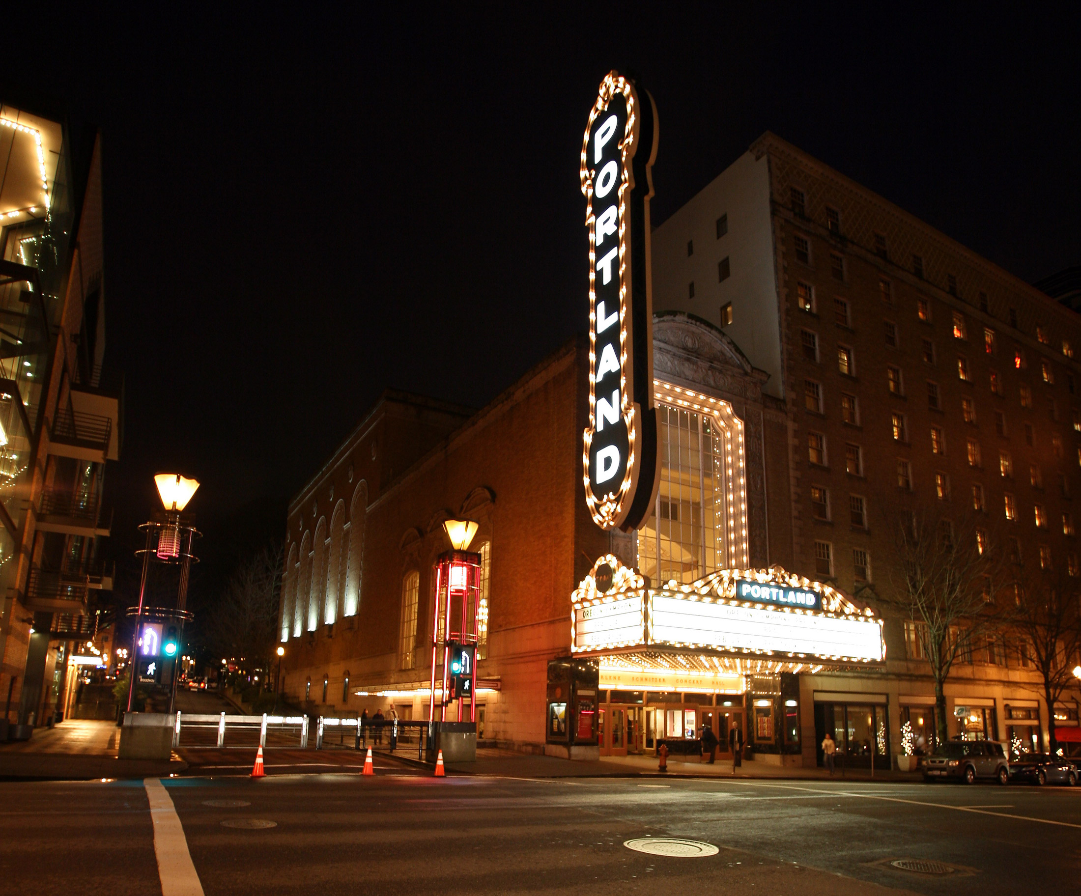 The Arlene Schnitzer Concert Hall in Portland, Oregon.